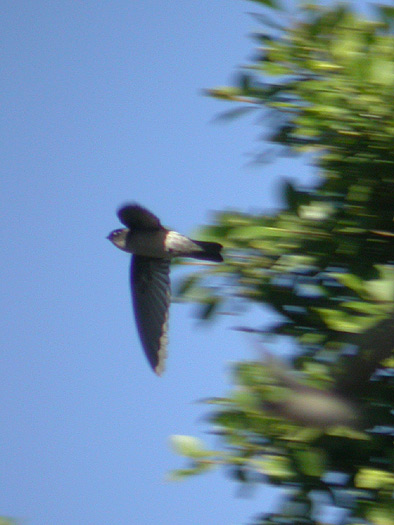 Salangane des Mascareignes Aerodramus francicus